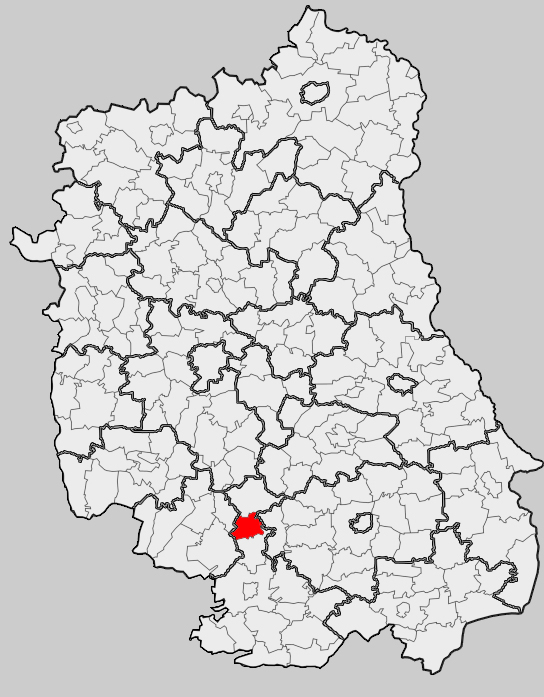 Map of gmina Goraj, Biłgoraj county, Lublin voivodship Mapa gminy Goraj, powiat biłgorajski, województwo lubelskie